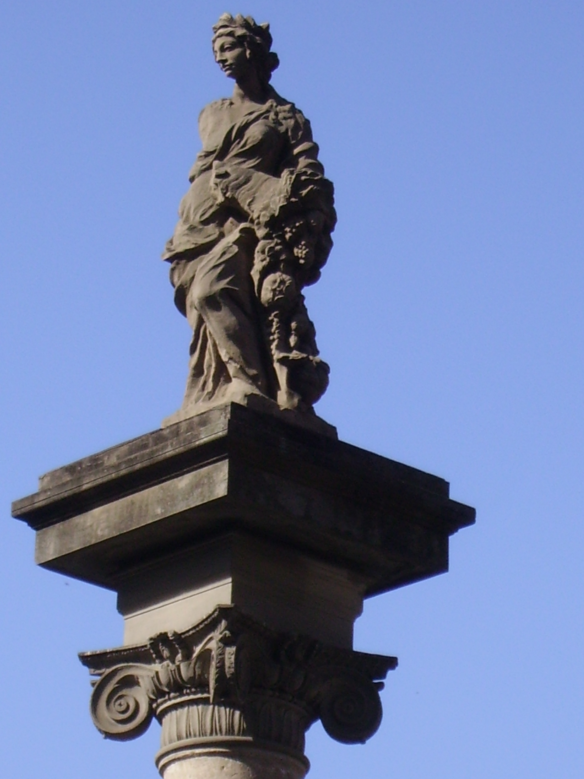 Abundance statue by Giovanni Battista Foggini on top of Colonna dell'Abbondanza, in Piazza della Repubblica, Florence, Italy Photographer: Yair Haklai, April 2008